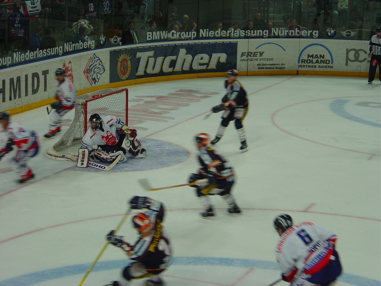 Die Ice-Tigers bei einem Heimspiel